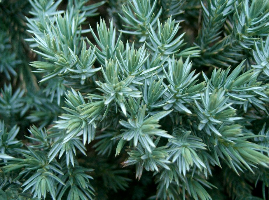 Juniperus squamata 'Blue Star'